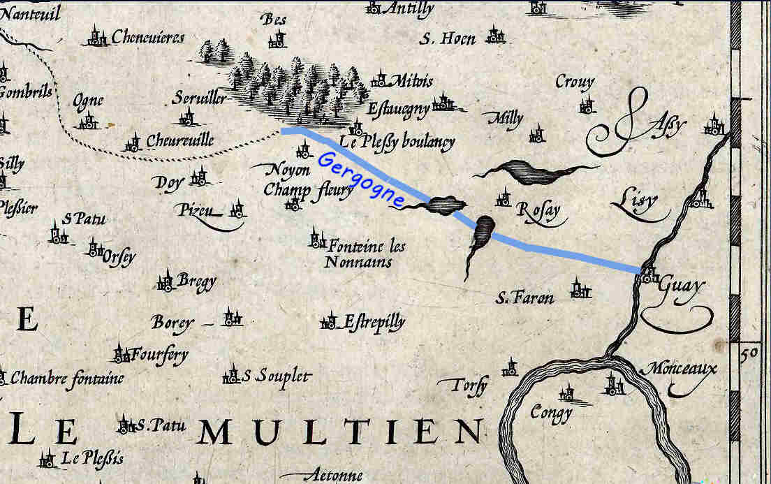 La Gergogne, en 1598, en pays de Multien, représentation approximative